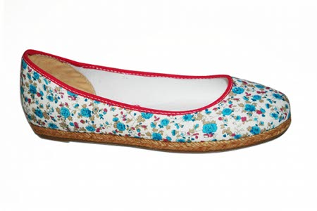 Maurice & Moi, ballerines liberty